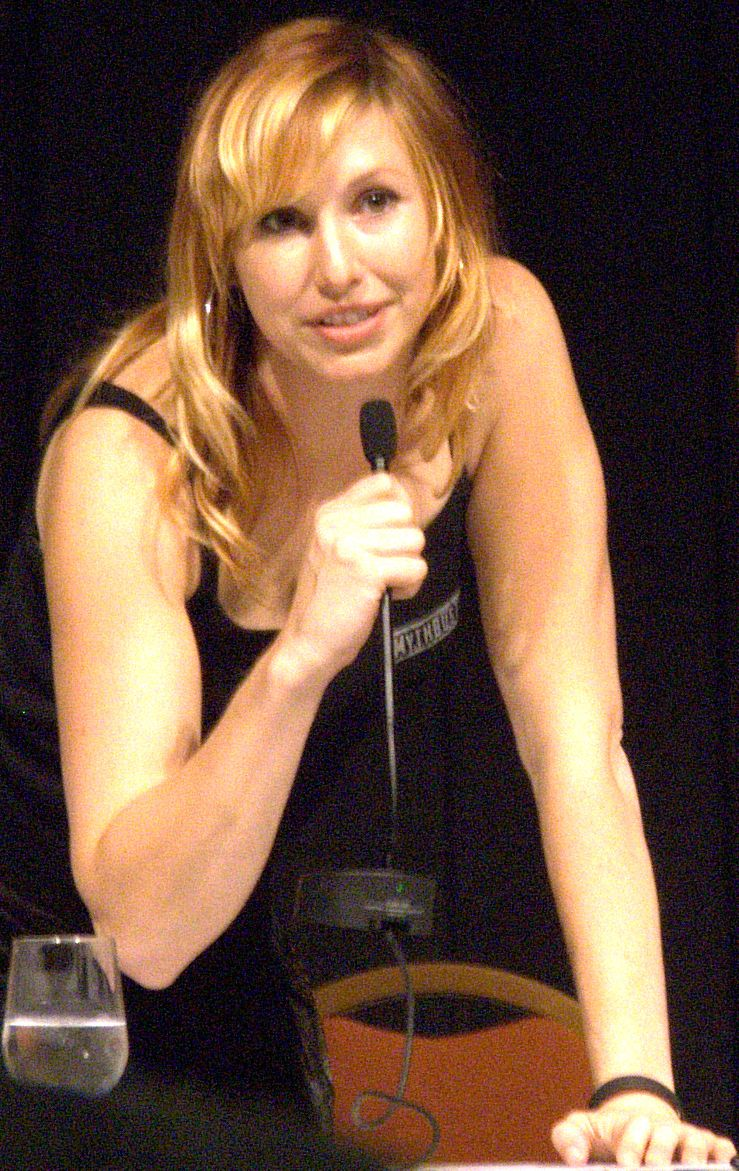 Kari Byron in Dragon Con 2006